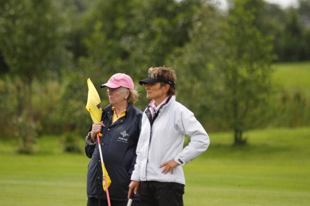 Rica van Campen, pro op Spaarnwoude, hier het NK Dames Professionals spelen op Delfland Golf